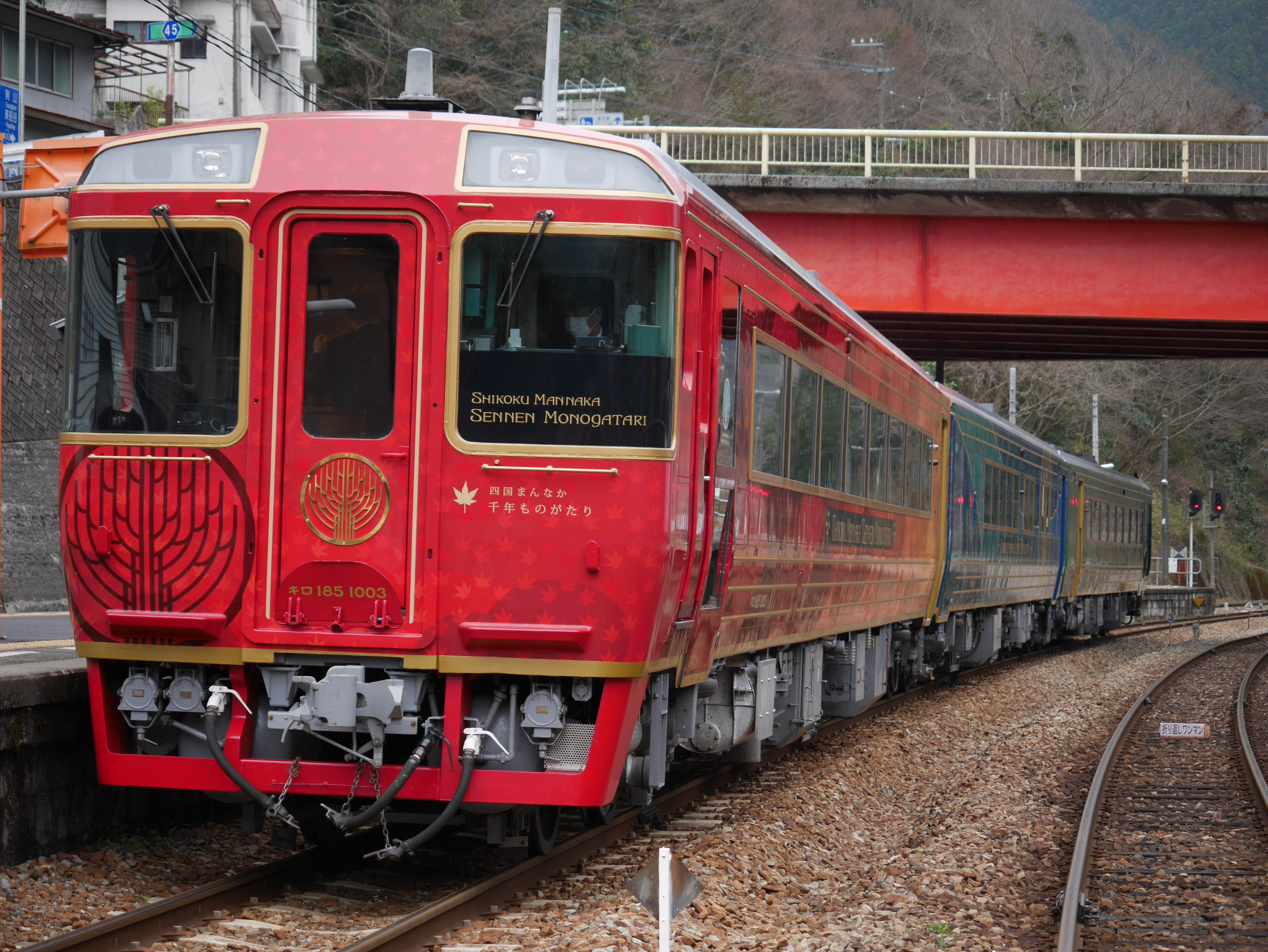 大歩危駅、「しあわせの郷紀行」発車前。手前から3号車、2号車、1号車の順。